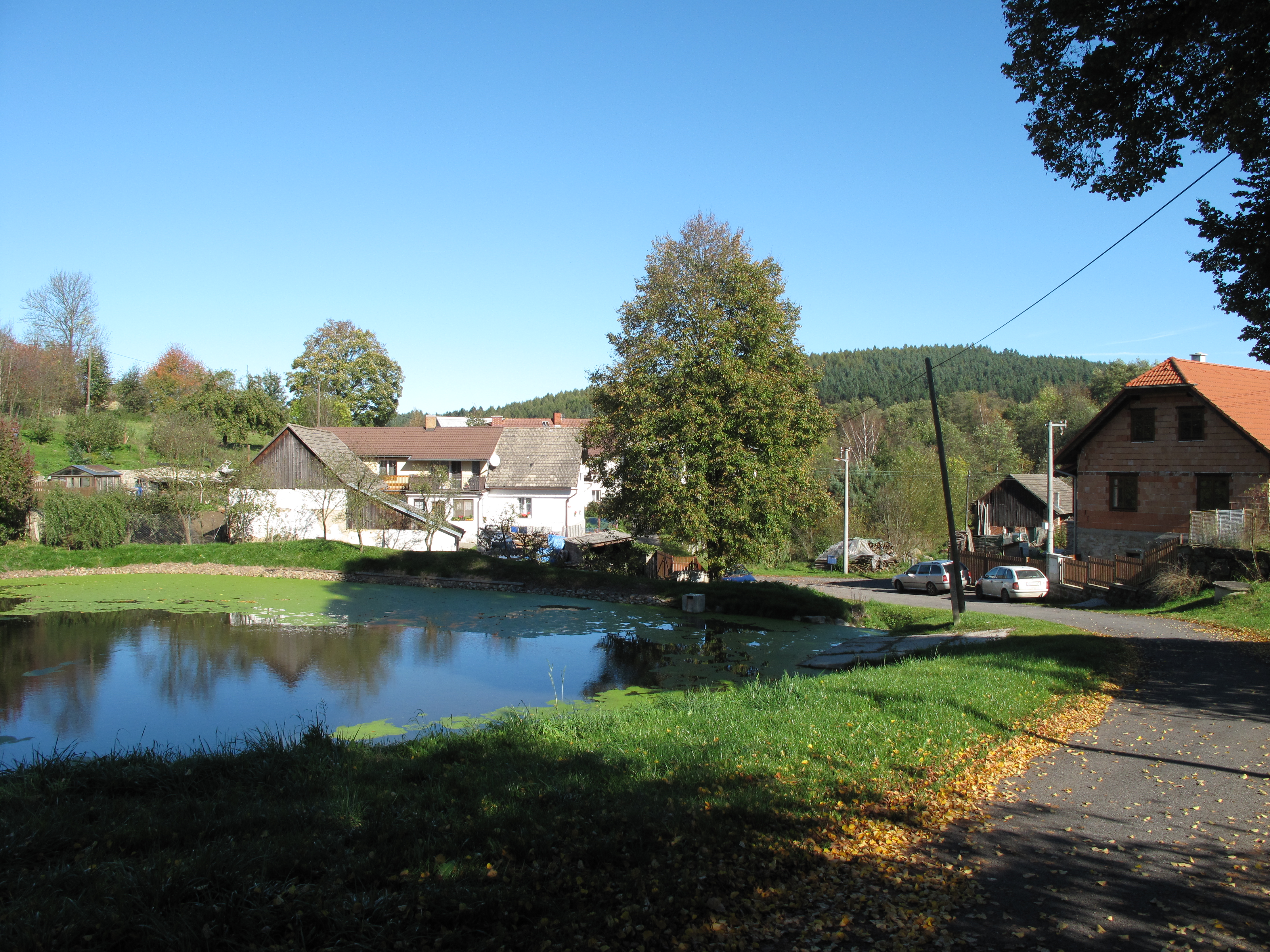 Rybník v Bratřejově. Okres Příbram, Česká republika.